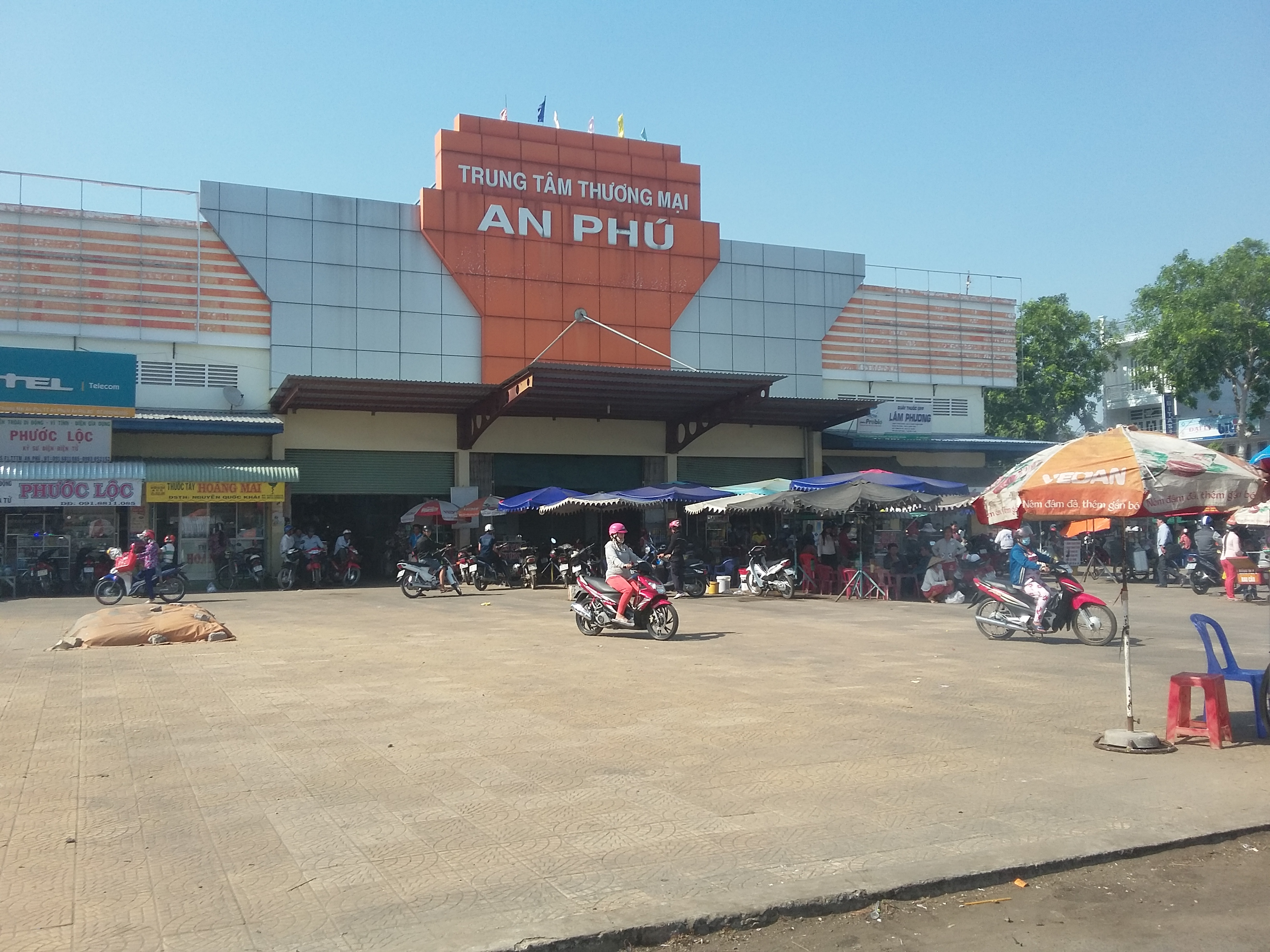 Trung tâm thương mại thị trấn An Phú - An Phu market 2016